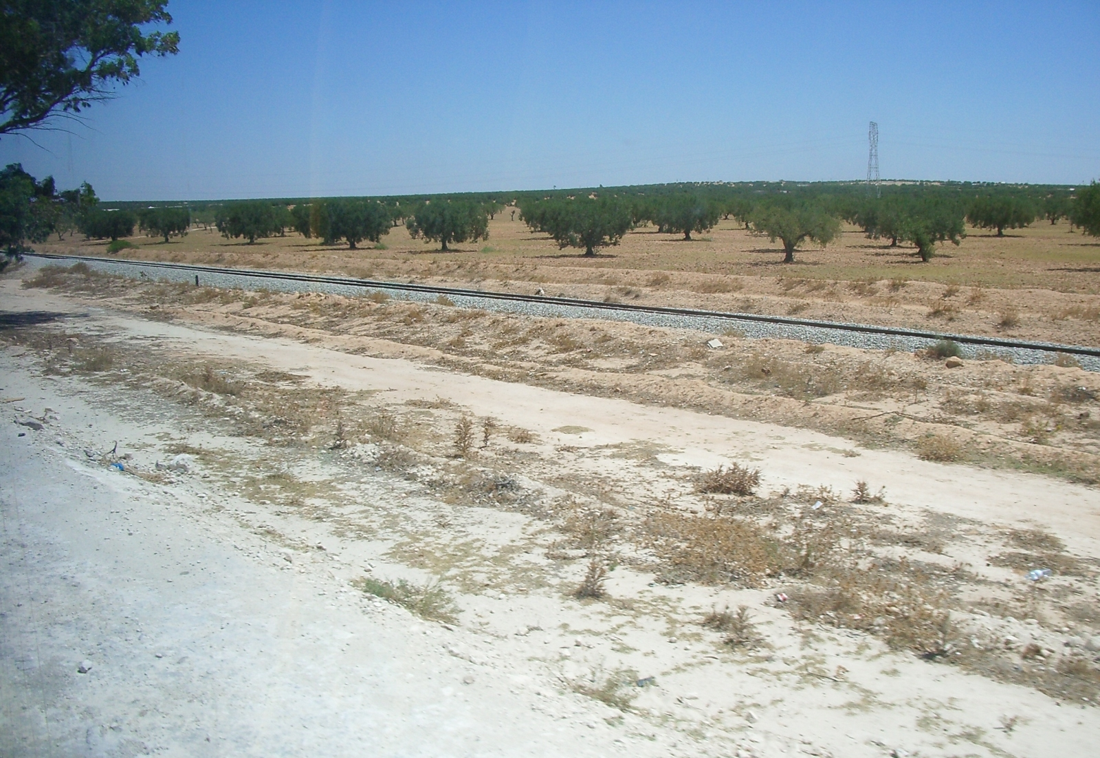 Via del ferrocarril a la vora de Sakiet Ezzit